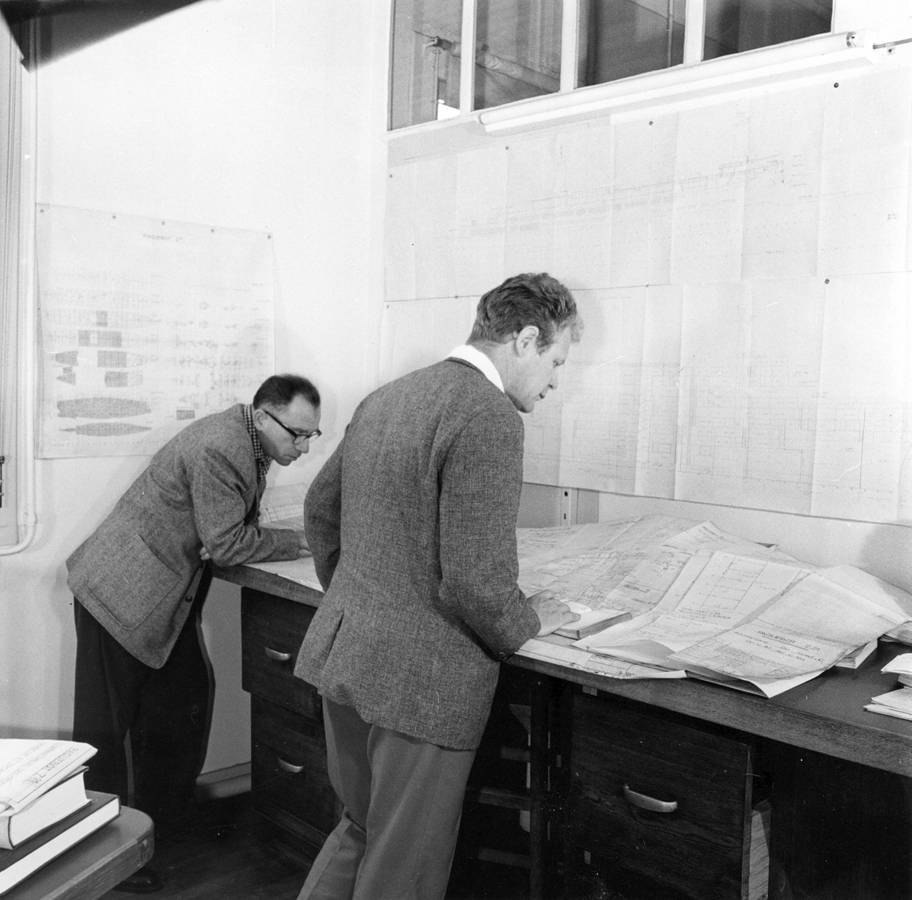 Edmond left side Marine Architect SS Shalom project in Chantiers de l'Atlantique